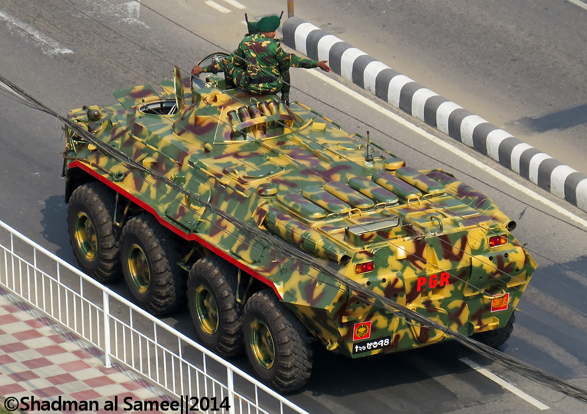 Bangladesh PGR BTR-80